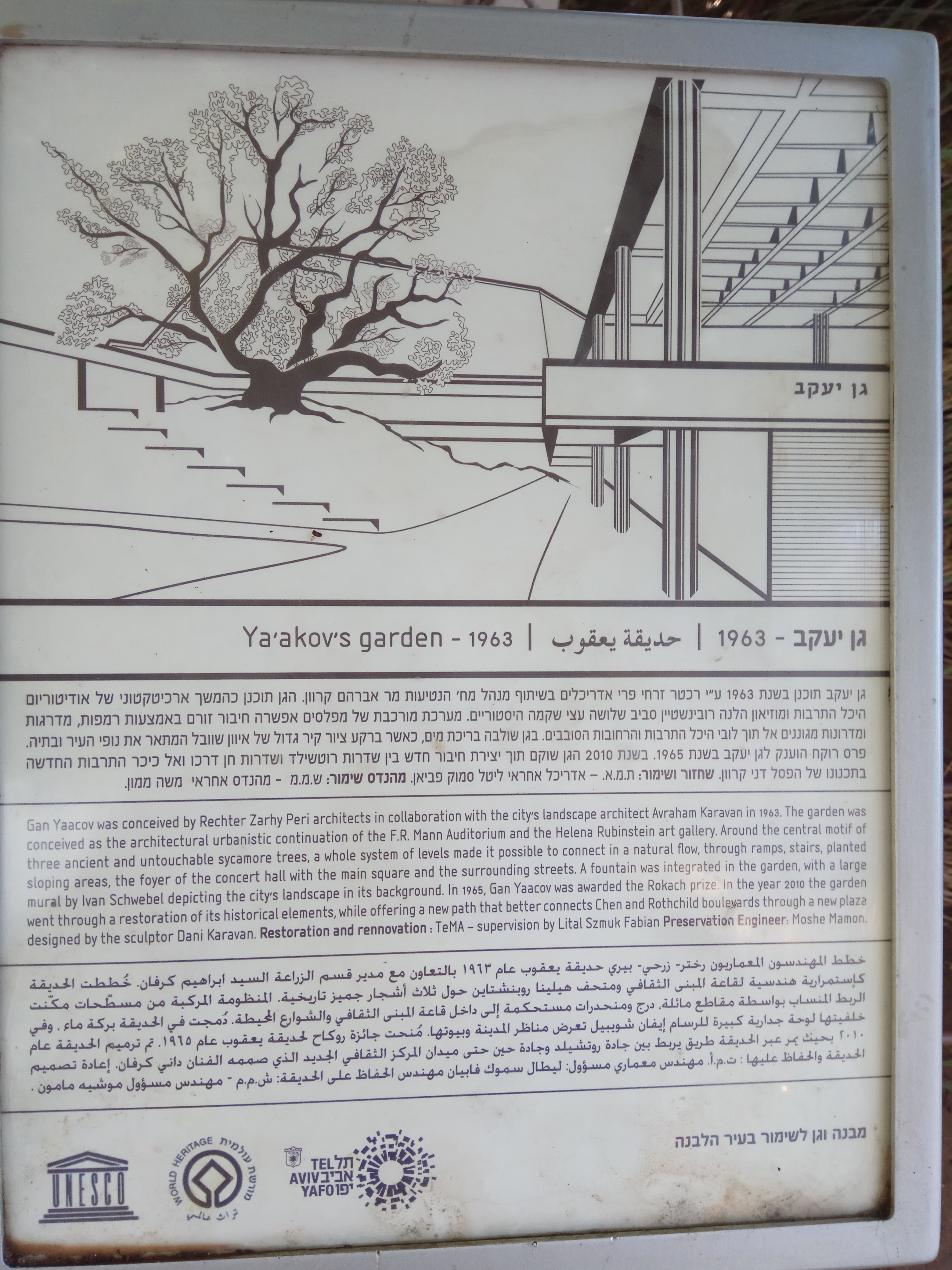 גן יעקב